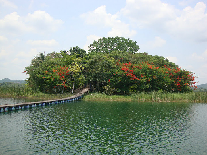 Entrada de Petencito.